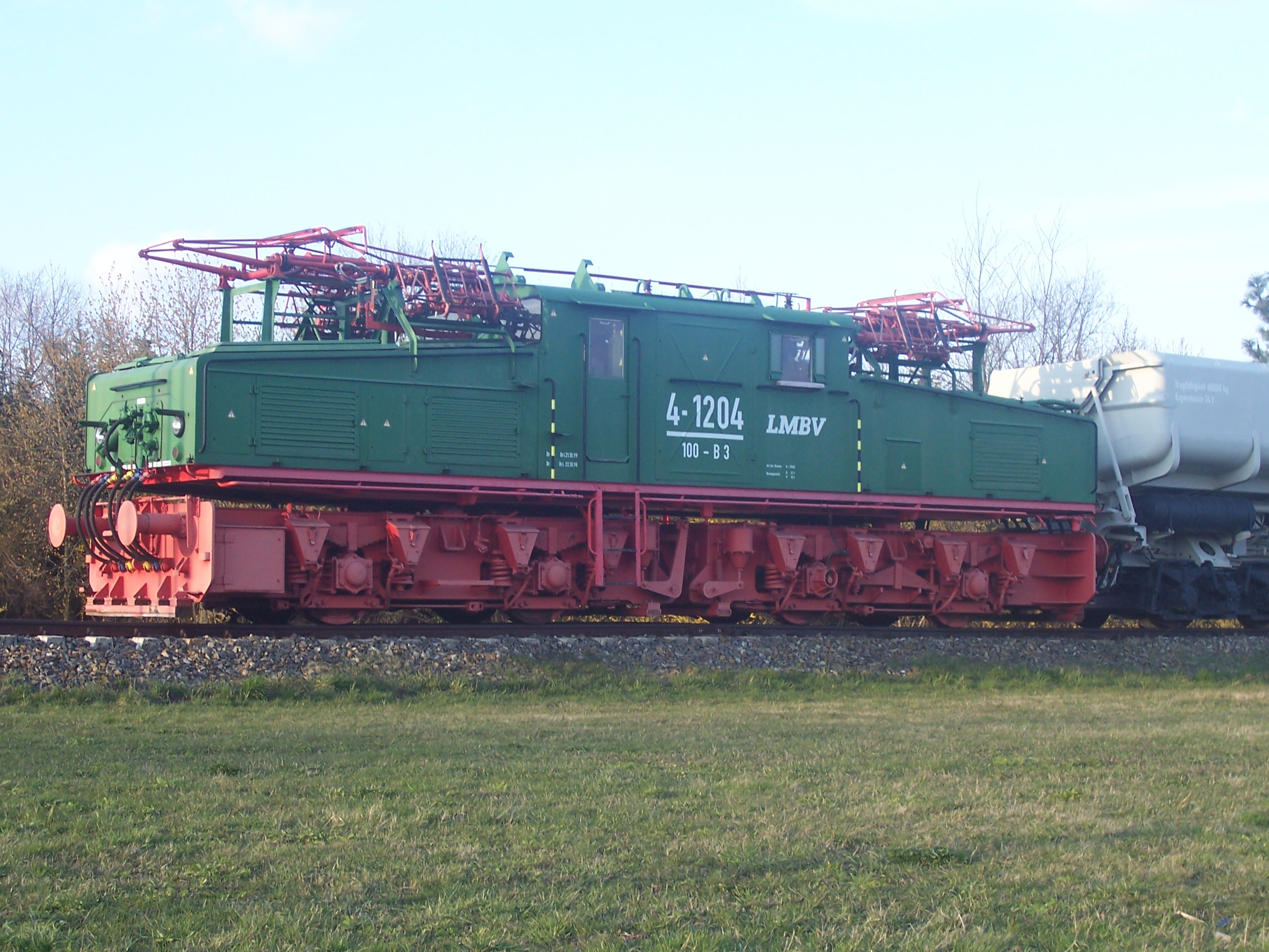 Bergbaulokomotive 4-1204 (Bauart EL 2 in Senftenberg.